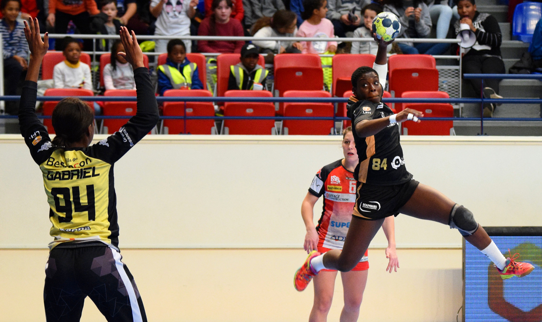 Match de LFH entre Issy Paris Hand et e A Coubertin, le 10 janvier 2018.